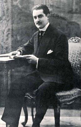 Fotografía del historiador, arqueólogo y político conservador ecuatoriano Jacinto Jijón y Caamaño; primer Alcalde moderno de la ciudad de Quito.